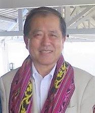 Iwao Kitahara, japanischer Botschafter in Osttimor